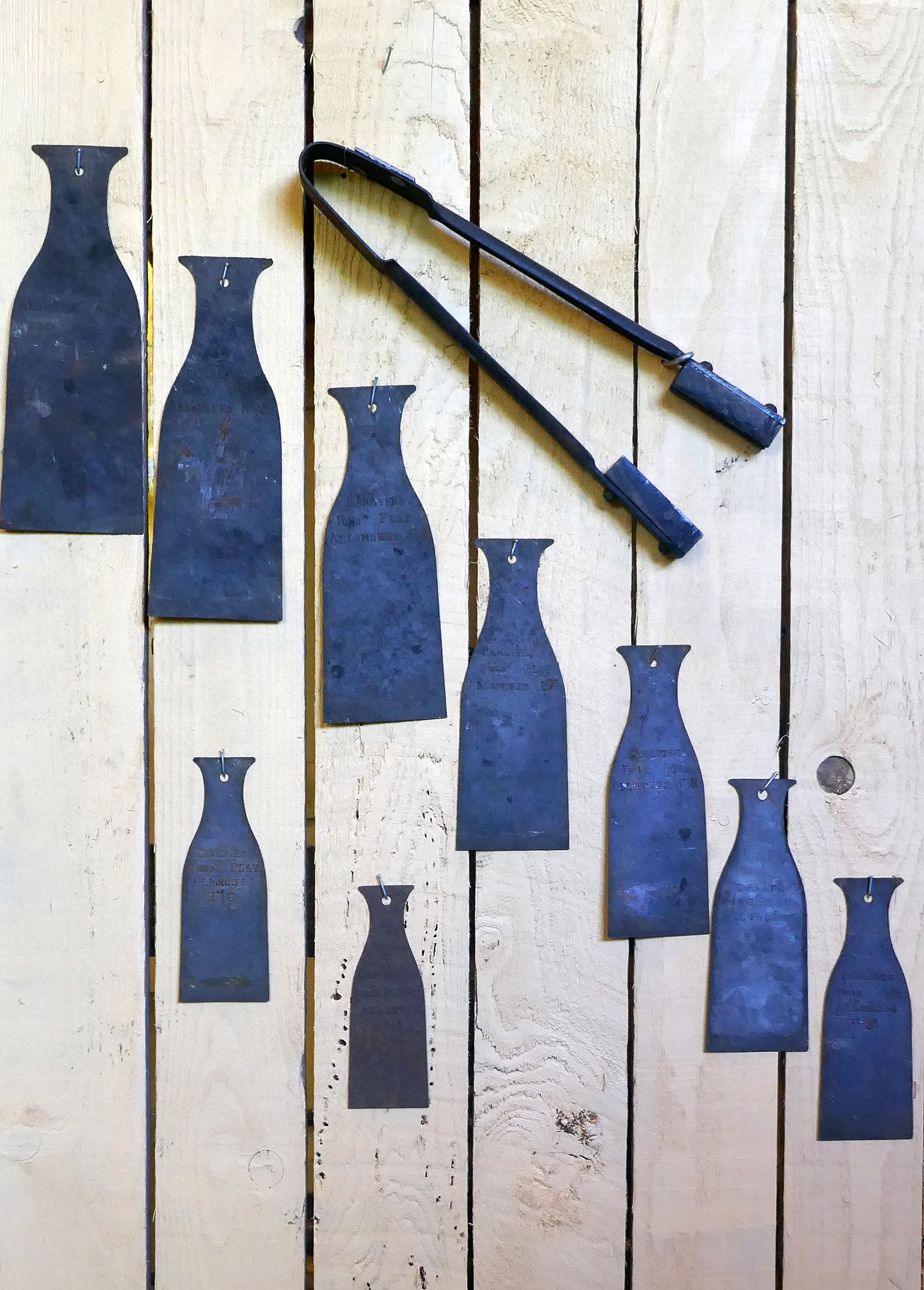 Pince pour la réalisation des jambes et gabarits : matériel de l'ancienne cristallerie de Portieux (Vosges) dans l'Écomusée ouvert sur le site industriel.